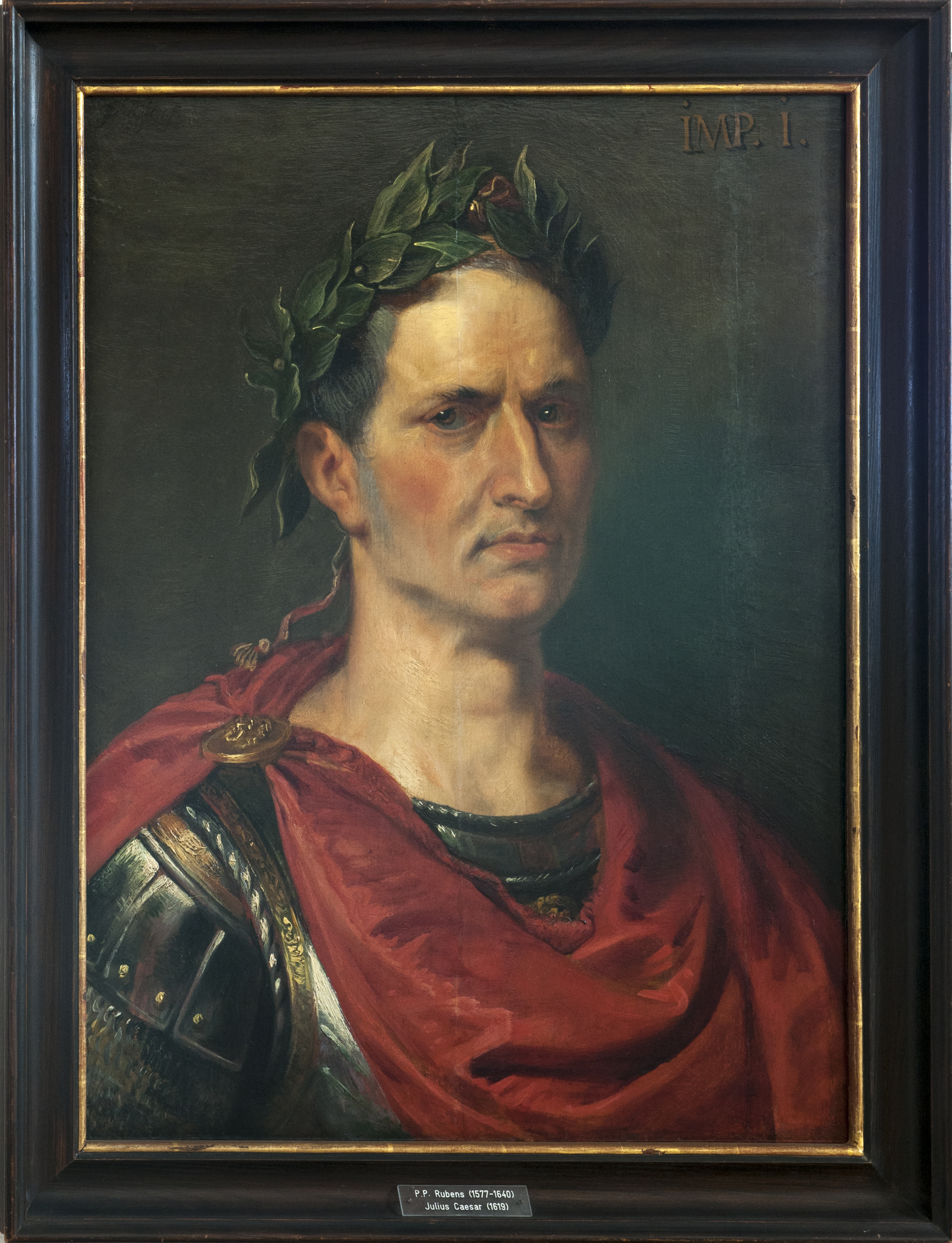 Teil einer Serie römischer Kaiserporträts niederländischer und flämischer Maler